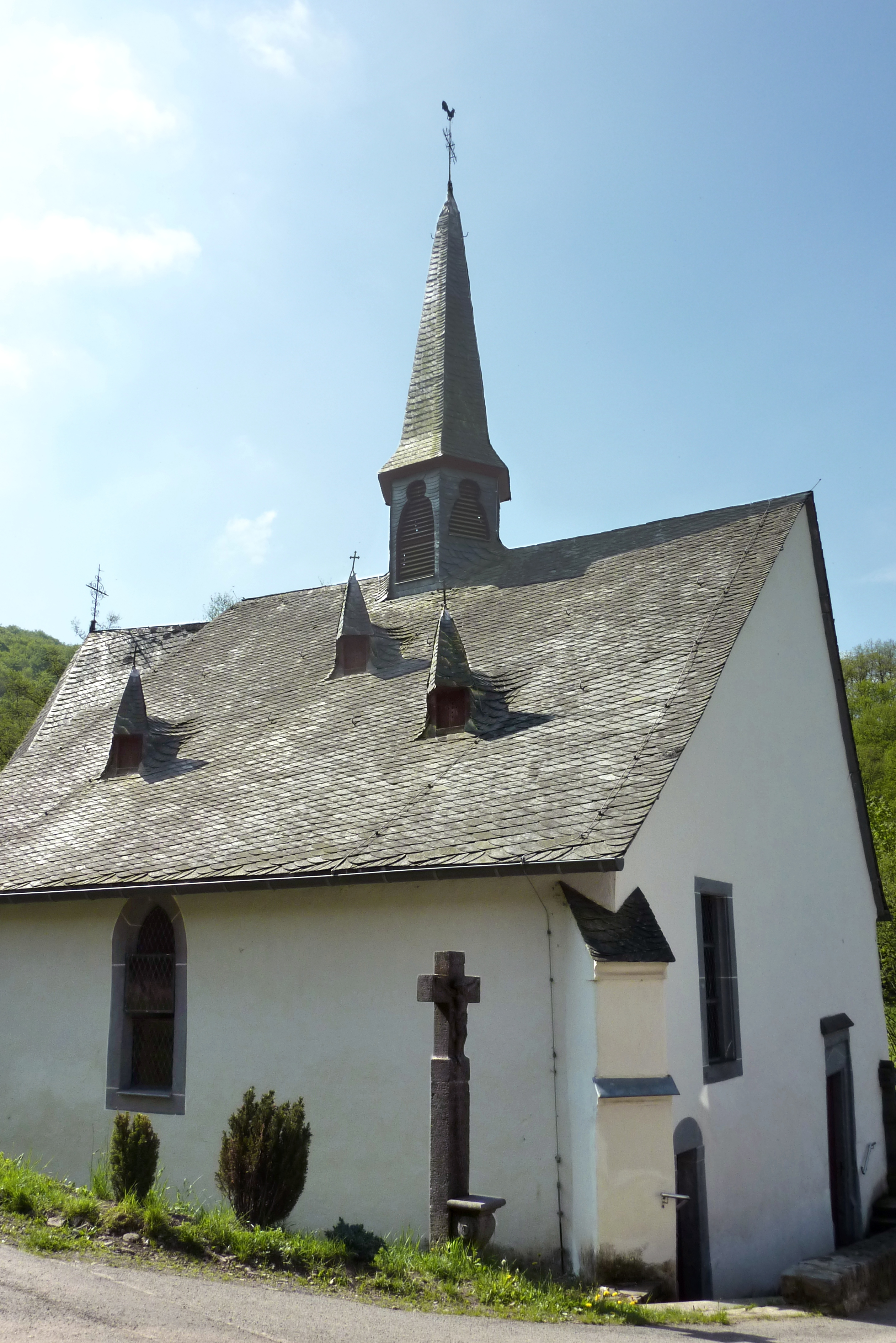 Wallfahrtskapelle St. Jost in Langenfeld (Eifel), Außenaufnahme